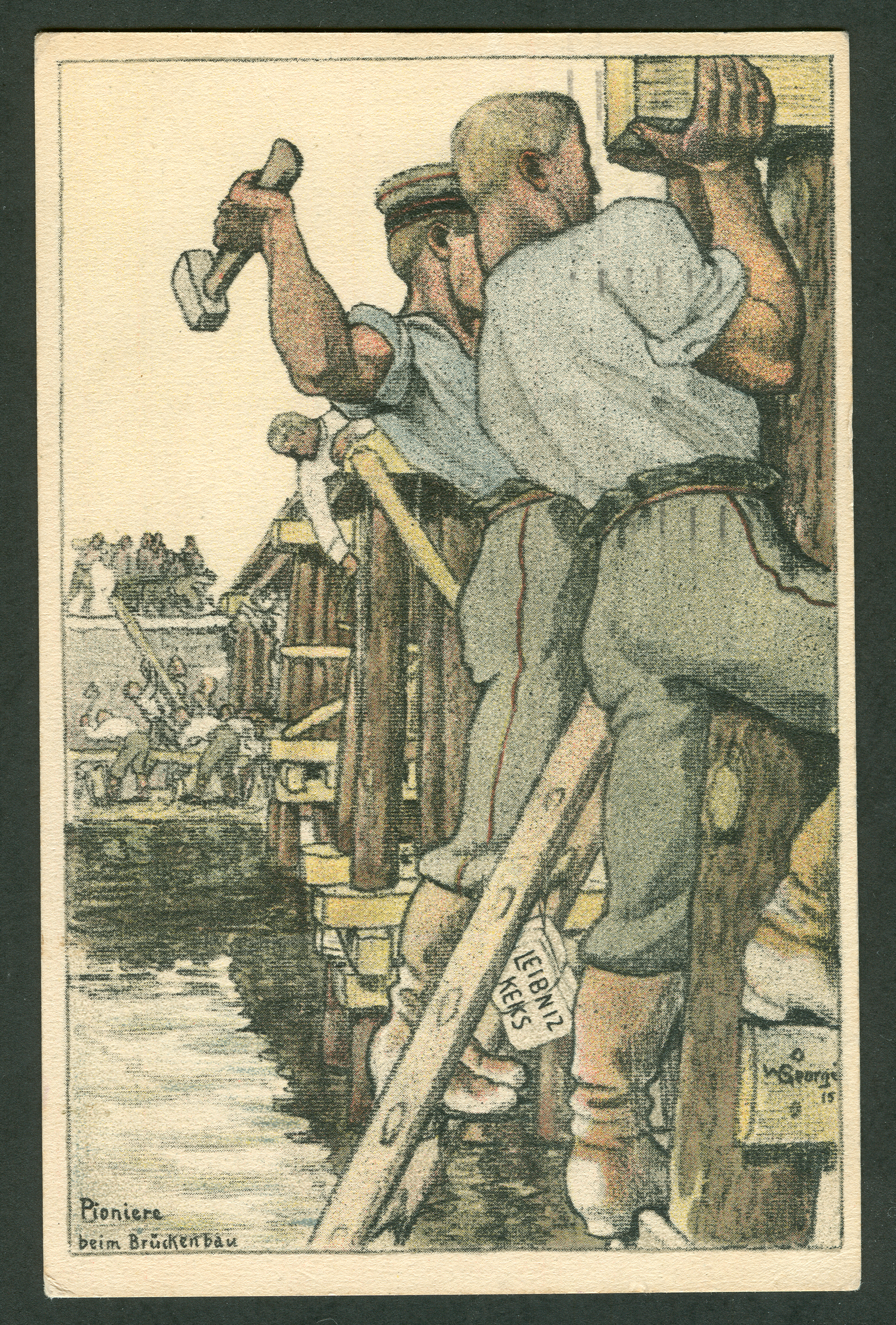 Professor Walter Georgi: Pioniere beim Brückenbau; unten rechts die Signatur "W. Georgi 15". Im Handel sogenannte "Künstlerpostkarte" oder auch "Reklamekarte", hier als Feldpostkarte im Ersten Weltkrieg für die "H. Bahlsens Keks-Fabrik, Hannover (siehe unten: Rückseite der 1916 postalisch gelaufenen Postkarte). Ein geschnürtes Paket mit der Aufschrift "Leibniz Keks" hängt im Vordergrund an der Leiter zur Versorgung der Soldaten an der Front.